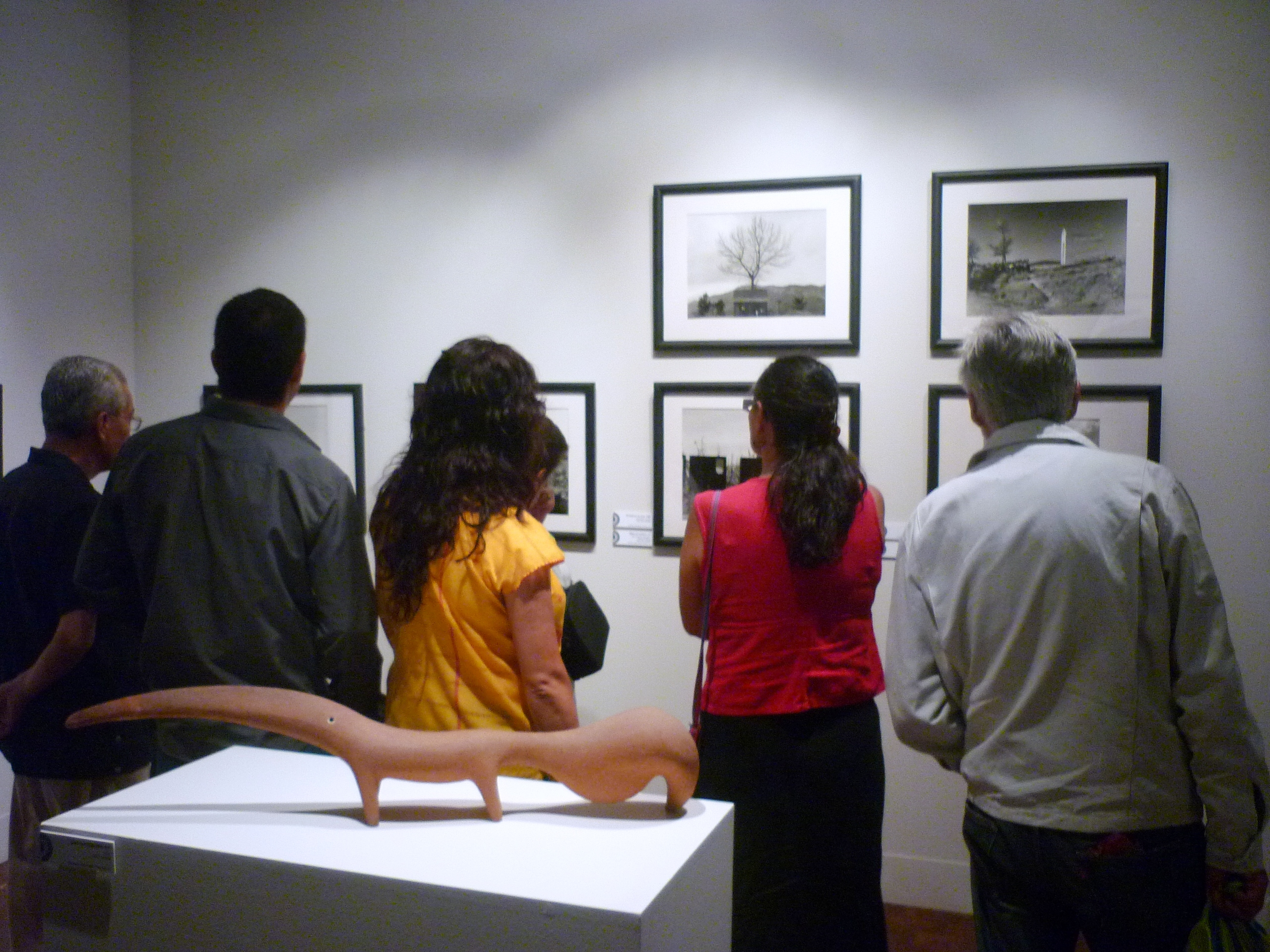 Asistentes a la inauguración de la exposición de Mariana Yampolsky en el Museo de Arte Popular